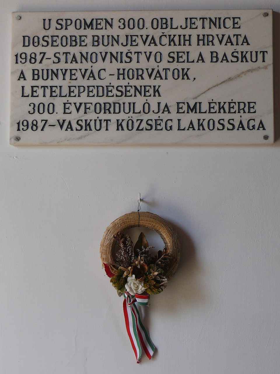 A bunyevácok letelepedése 300. évfordulójának emléktáblája Vaskúton